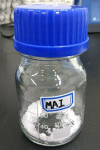 CH3NH3I powder